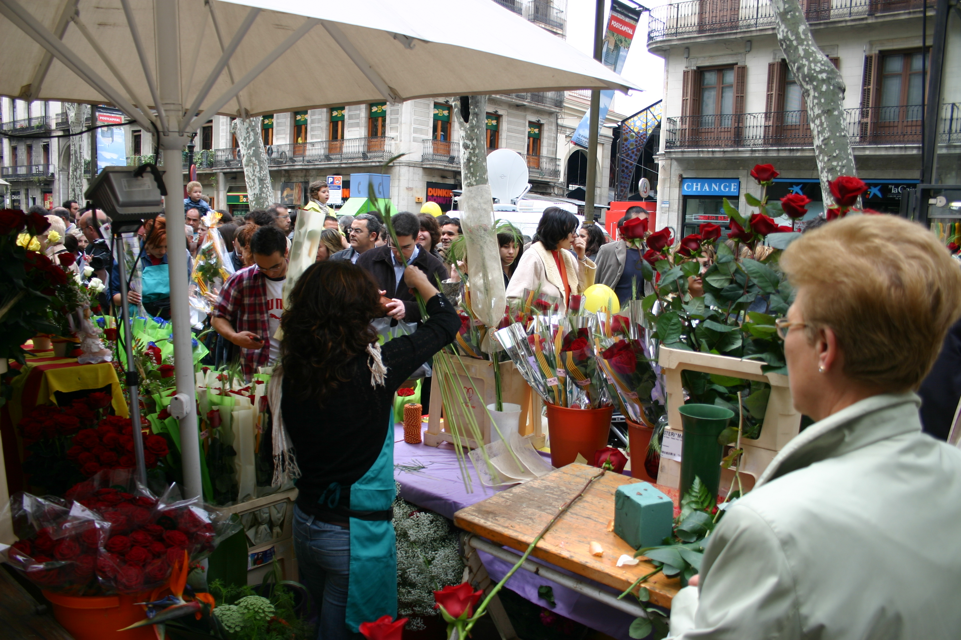 Diada de Sant Jordi. Florista de Las Ramblas preparando una rosa su venta. Barcelona, Catalonia (España). Author: User:Yearofthedragon